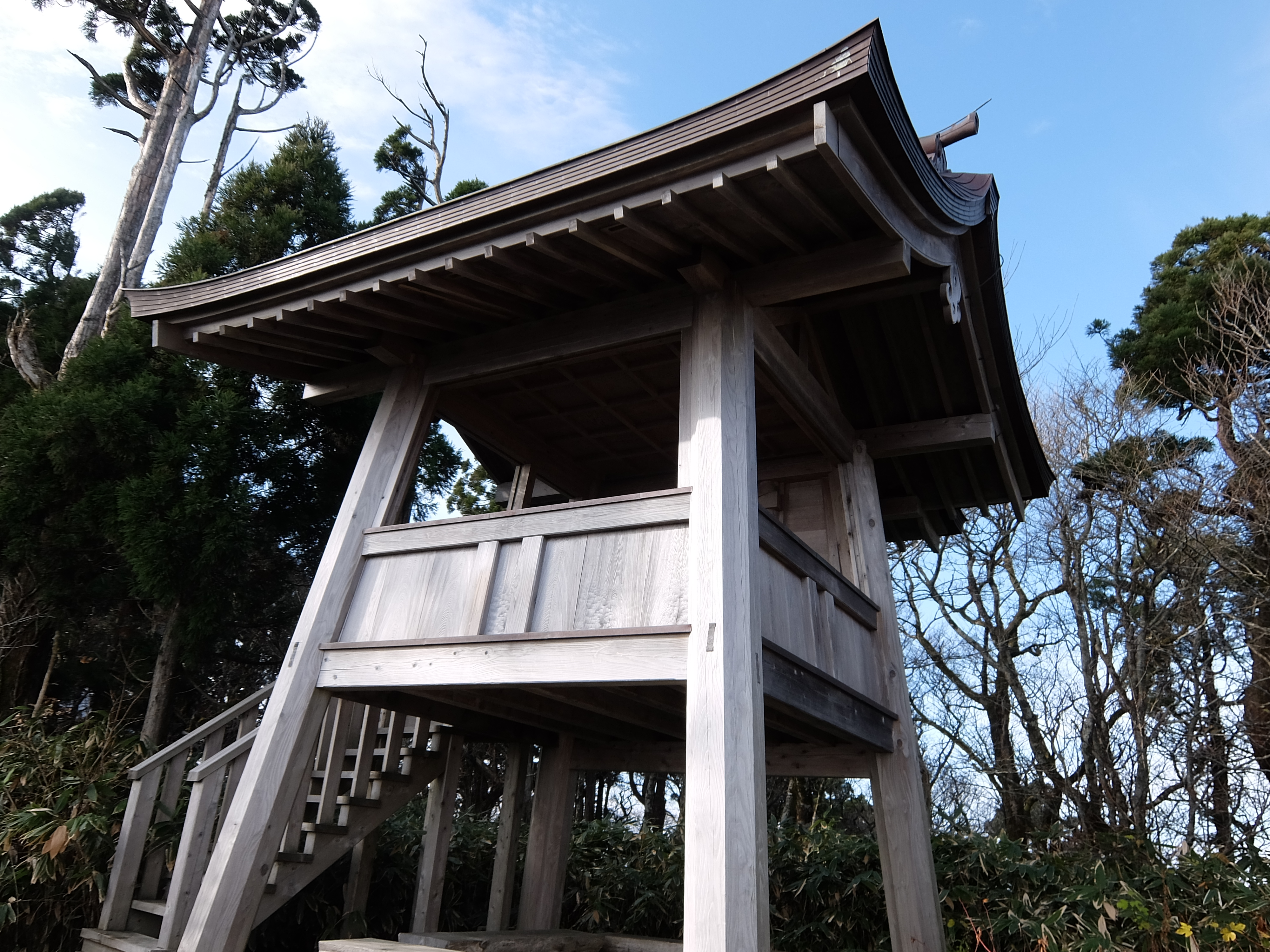 男鹿真山山頂の神社